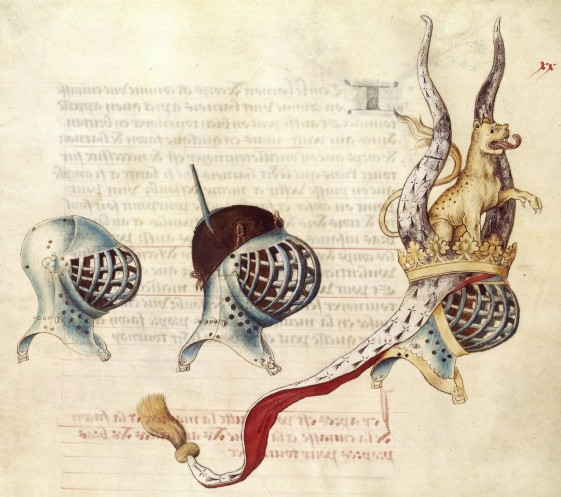 Heaume du Duc de Bretagne